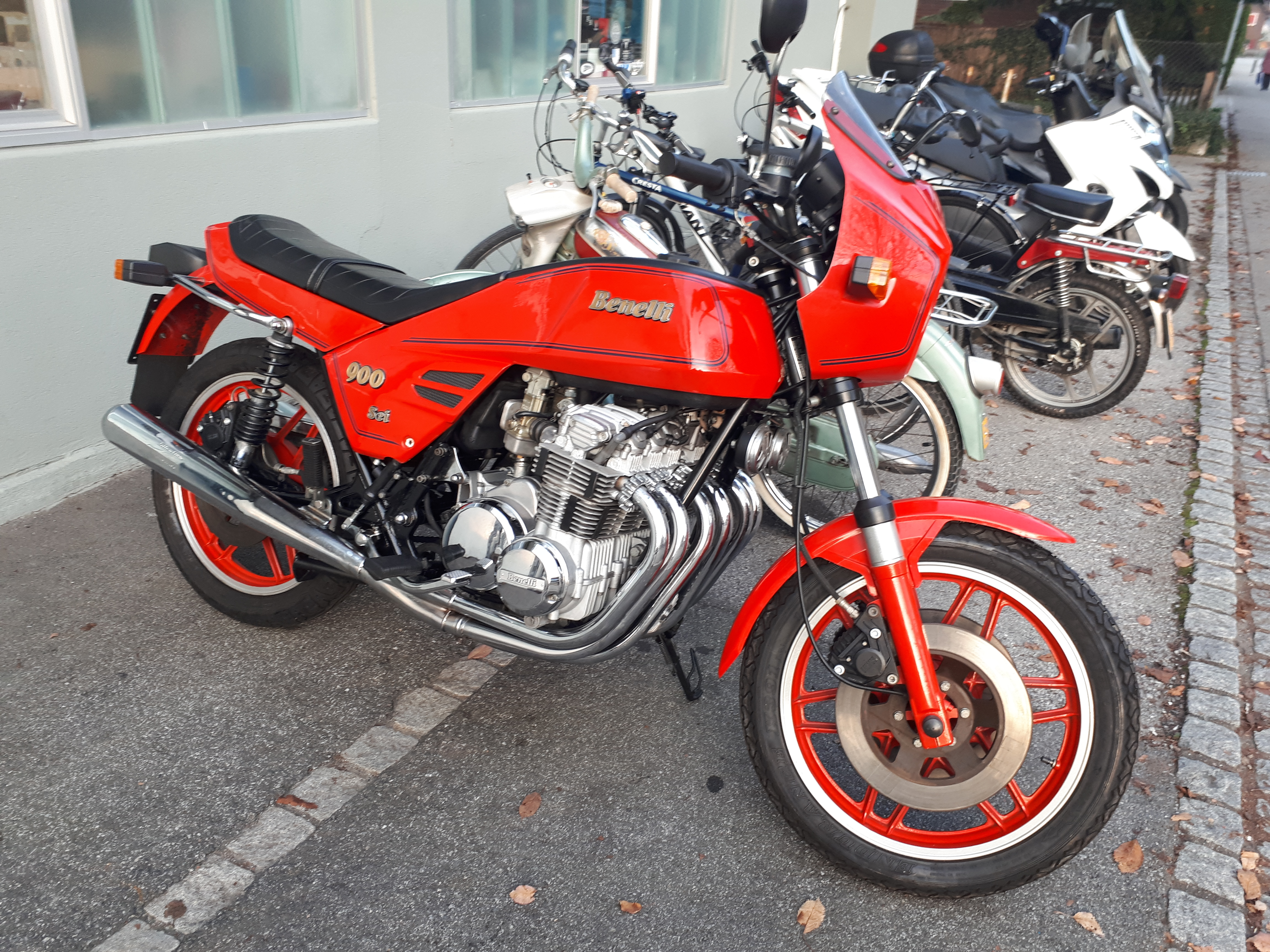 Benelli Sei 900 6-Zylinder